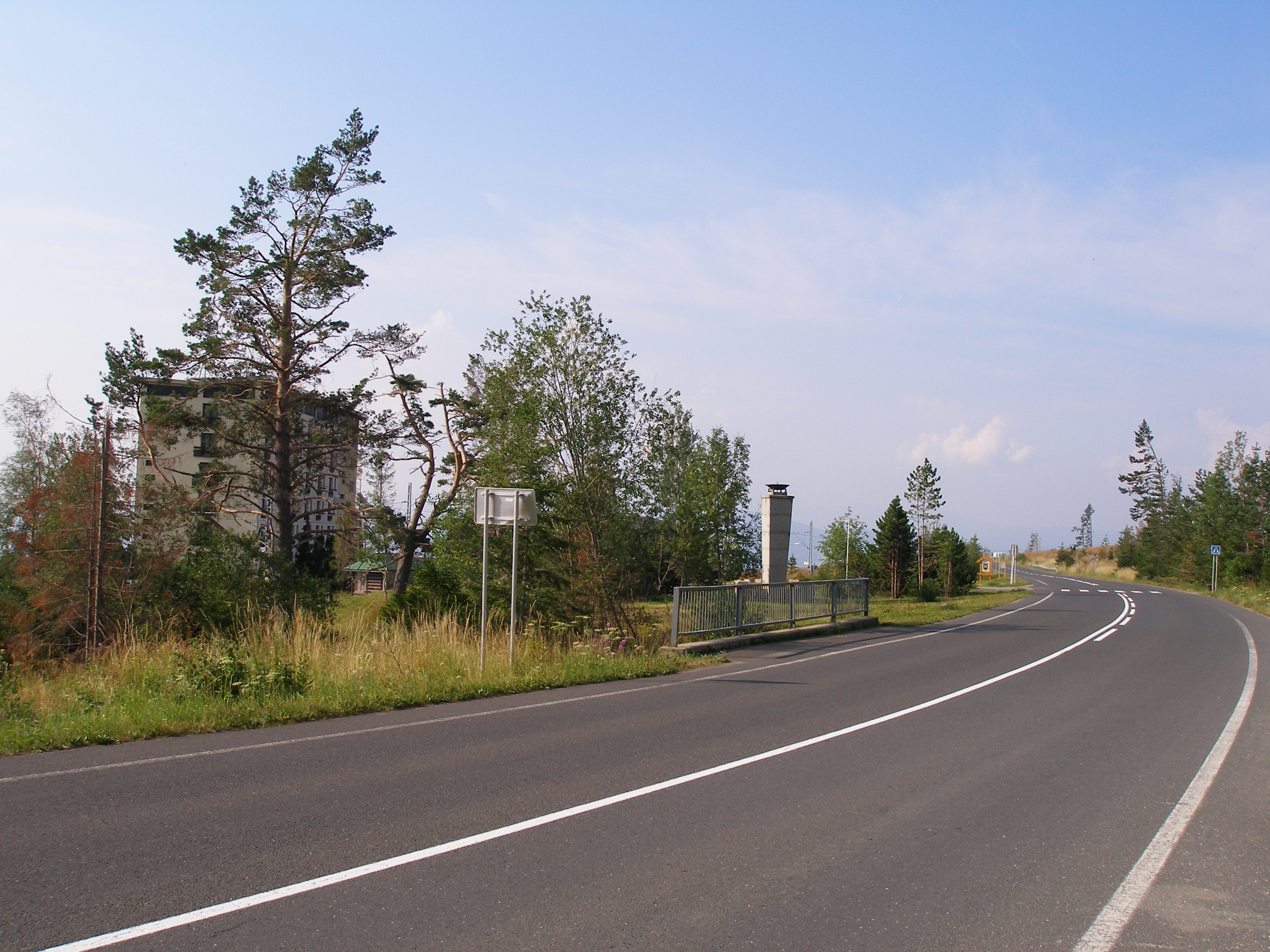 Osada Tatranské Zruby, Slovakia